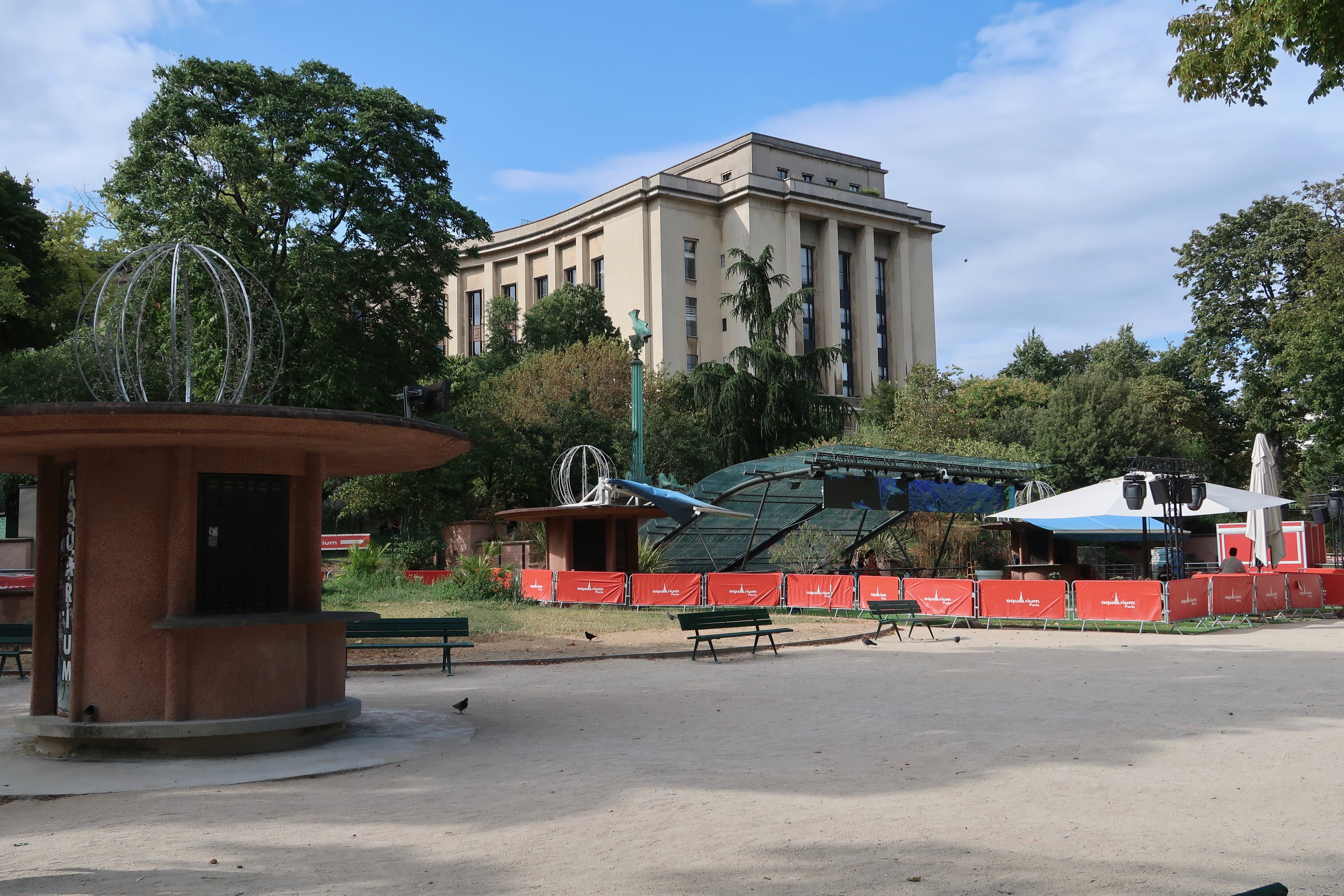 Entrée de l'aquarium de Paris - Cinéaqua (jardins du Trocadéro, Paris, 16e).